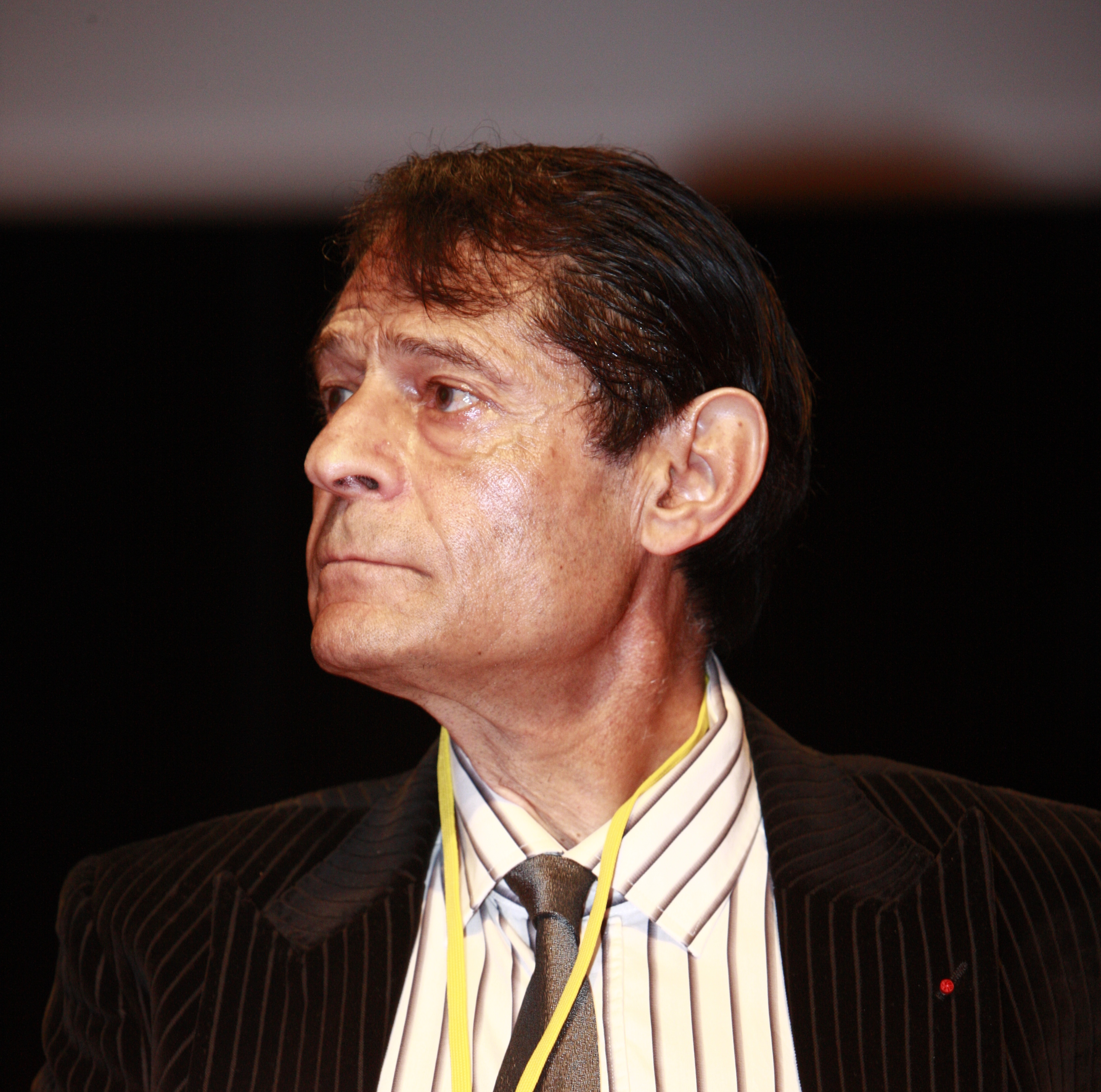 Claude Hagège à la Conférence-débat "La France joue-t-elle dans la cour des grands ?"